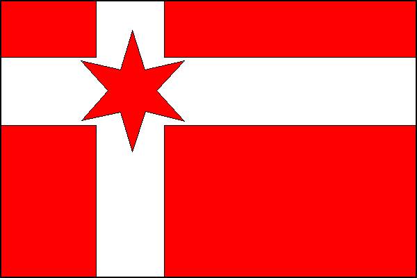 vlajka, Vídeň, okres Žďár nad Sázavou